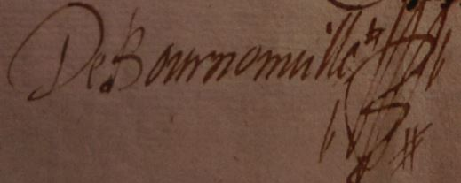 Signature de Jean de Bournonville, 1623.